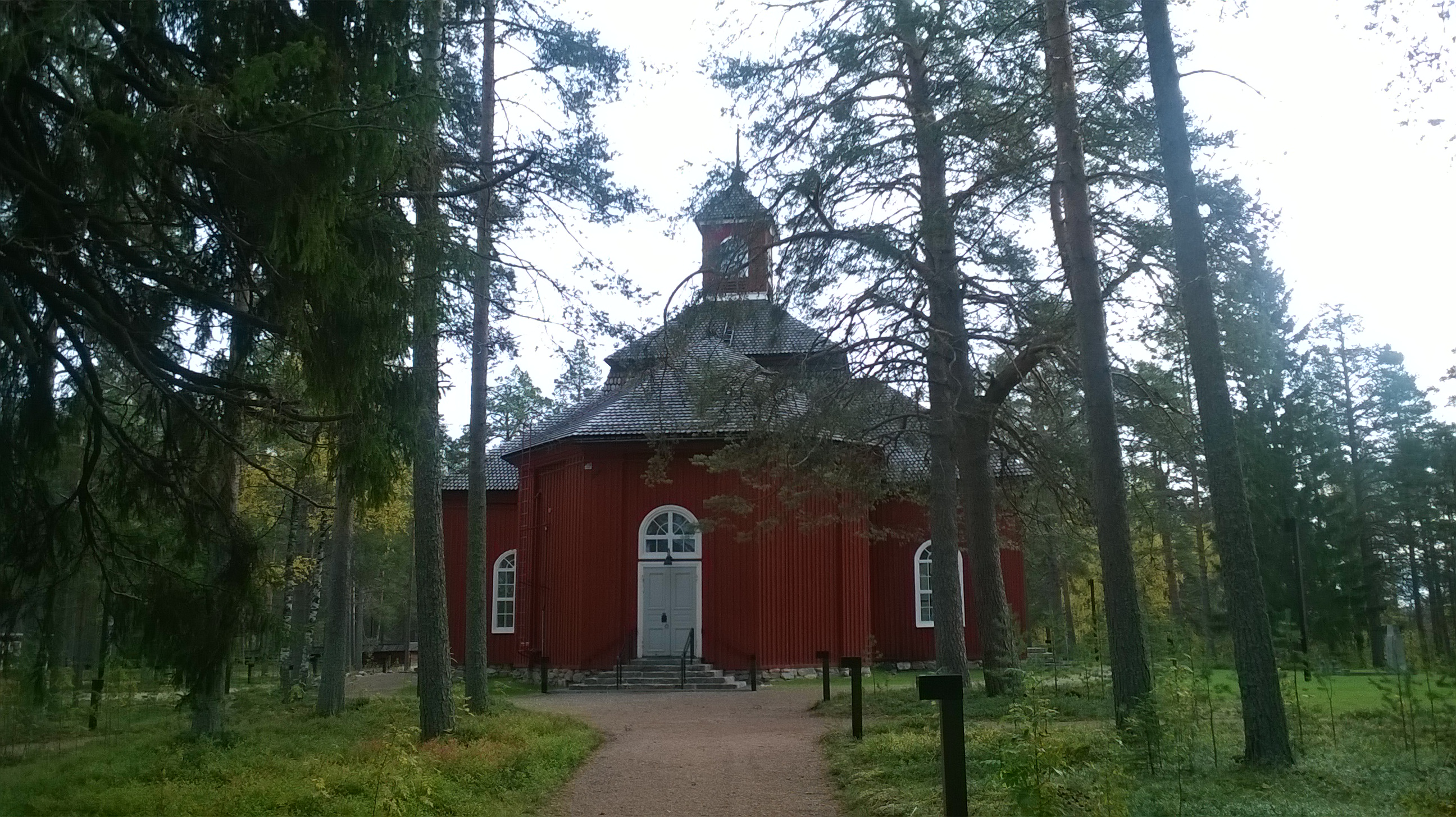 Pudasjärven kirkko; church in Pudasjärvi, Finland